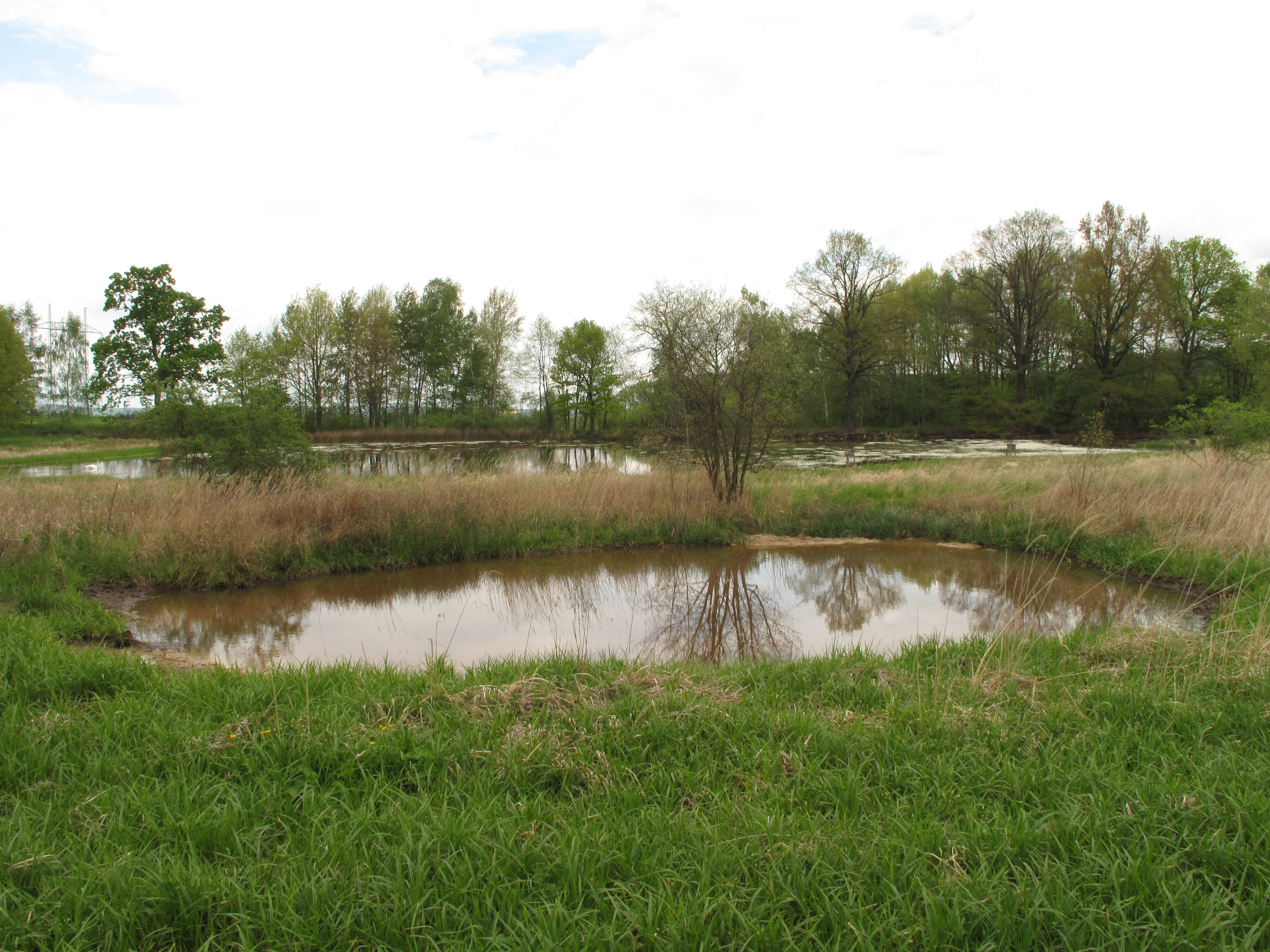 Přírodní památka Slavkov. Okres Benešov, Česká republika.